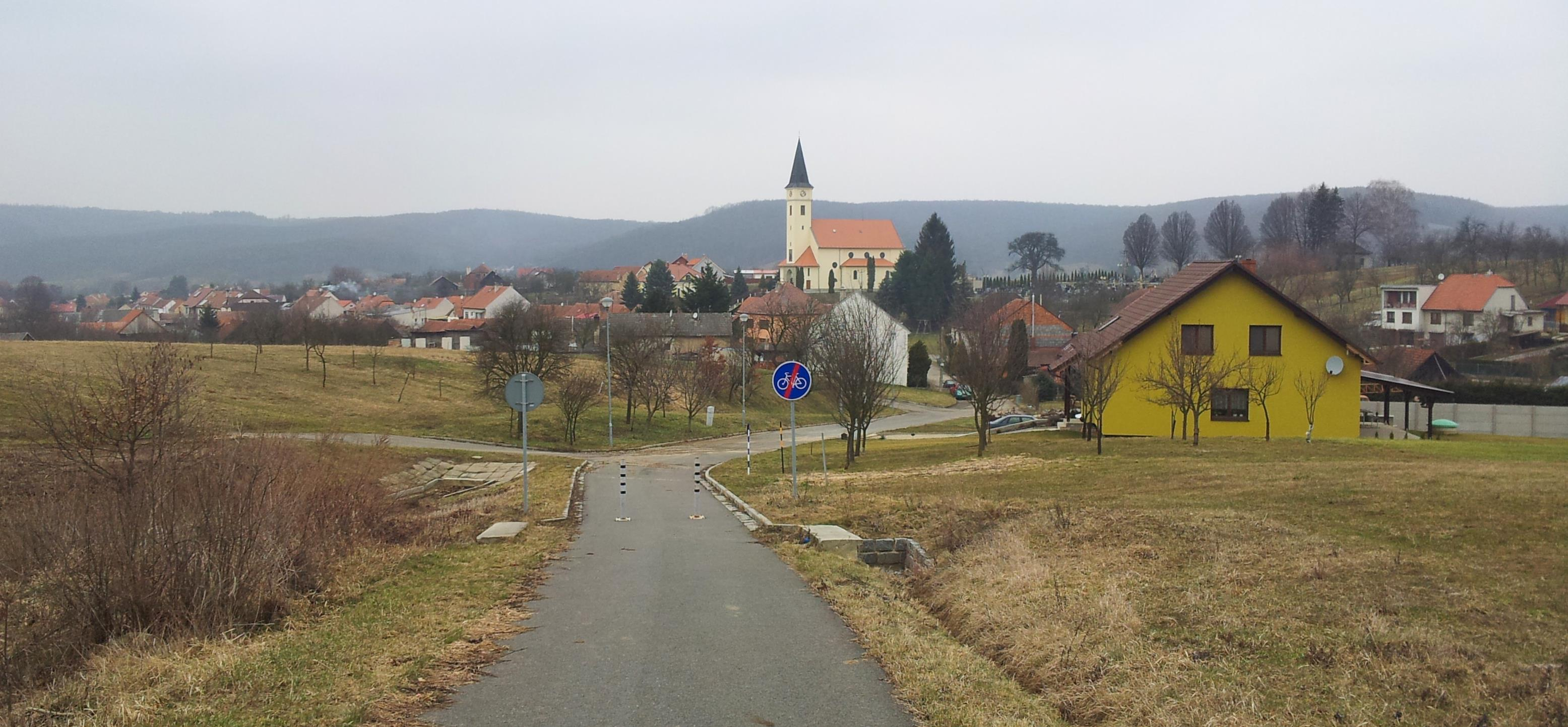 Prakšice